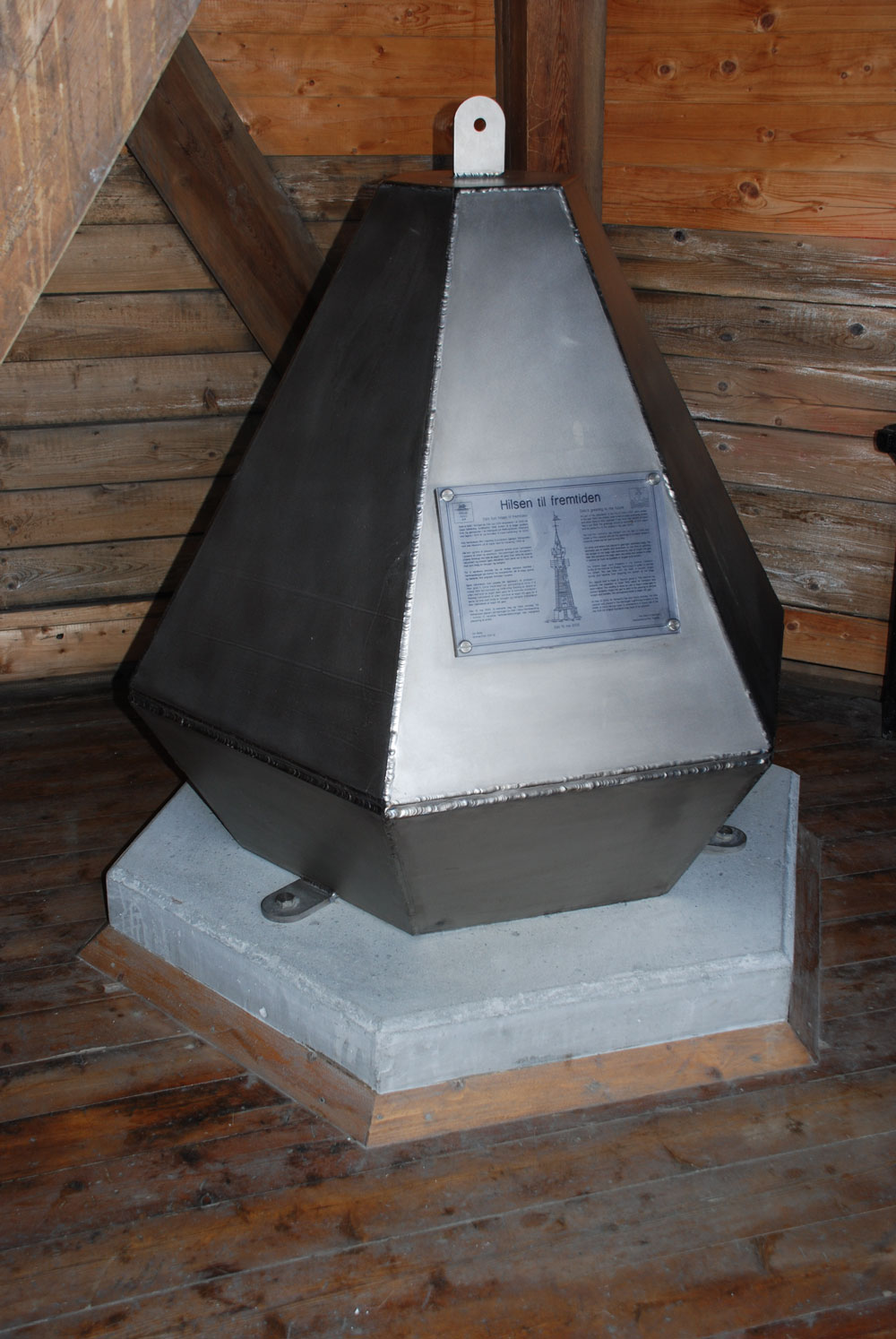 Oslos tidskapsel - hilsen til fremtiden.